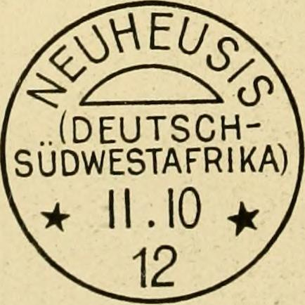 Identifier: diepostwertzeich00friedem Title: Die postwertzeichen und entwertungen der deutschen postanstalten in den schutzgebieten und im auslande Year: 1921 (1920s) Authors: Friedemann, Albert Subjects: Postage stamps Postmarks Publisher: Leipzig, A. Friedemann Text Appearing Before Image: Vom I. Dezember igijr](auch schwarzviolett)bis Anfang Mai ig iß auf SüdwestafrikaNr. 13-32, 34. Neuheusis, Post- hilfsstelle * 2. Juni 1912. Text Appearing After Image: Vom 2. Juni igi2 bis Anfang Mai igiS auf Südwrslafrika Nr. 13-32, 34. Uer Stempel ist den Feinden in die Hände gefallen. Okasise, 11. Juni 1906. \pm II. Juni igrjöbis 4. Mai igif, auf SüdwestalVikaNr. 13-32, ,34. Okaukwejo, * 1. Januar 1908.